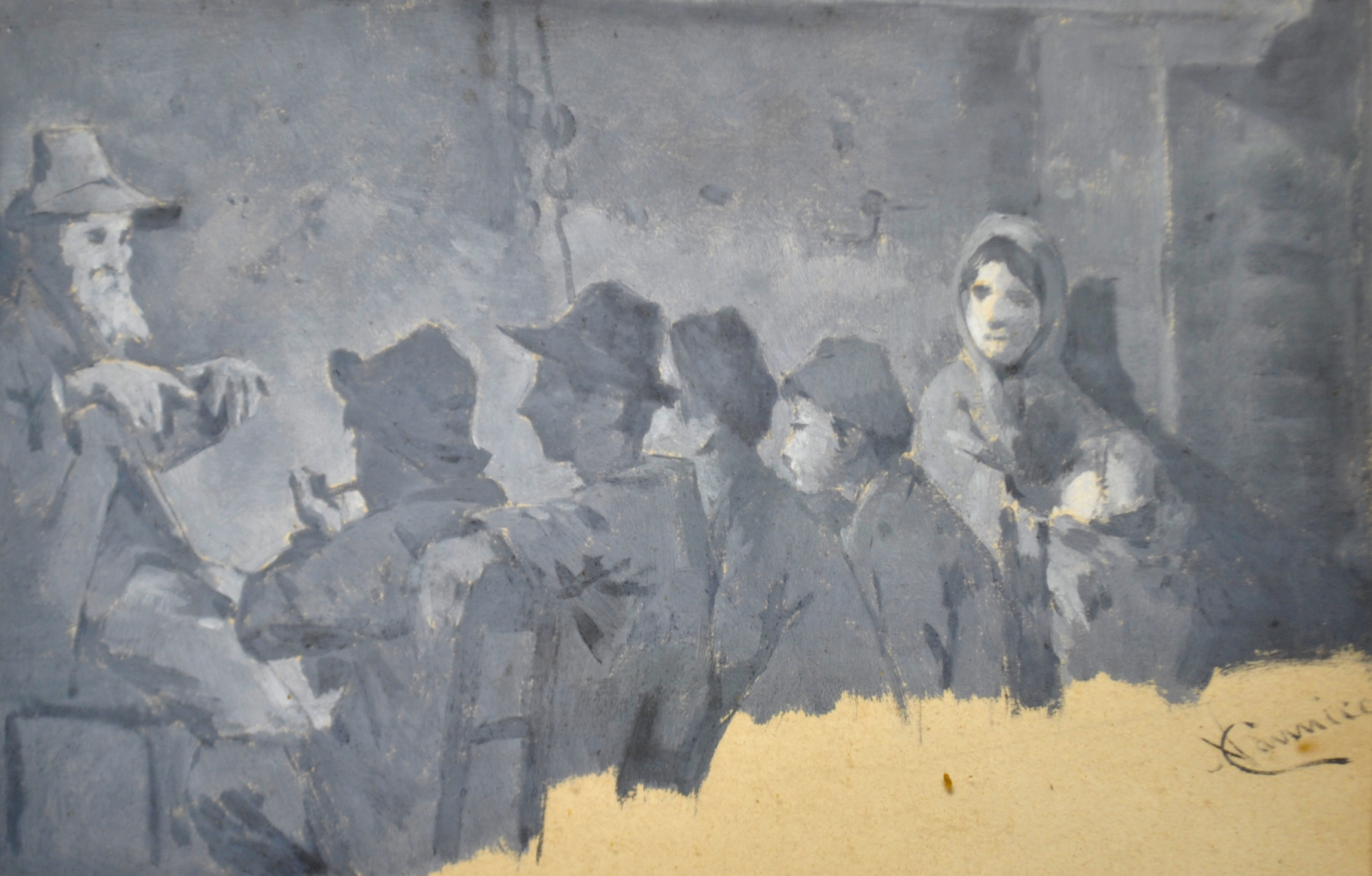 Niccolò Cannicci, Batone racconta, acquerello su carta, cm 16x25, 1890, illustrazione per il racconto La pipa di Batone pubblicato in Le veglie di Neri di Renato Fucini, collezione privata (già collezione Renato Fucini, Firenze)